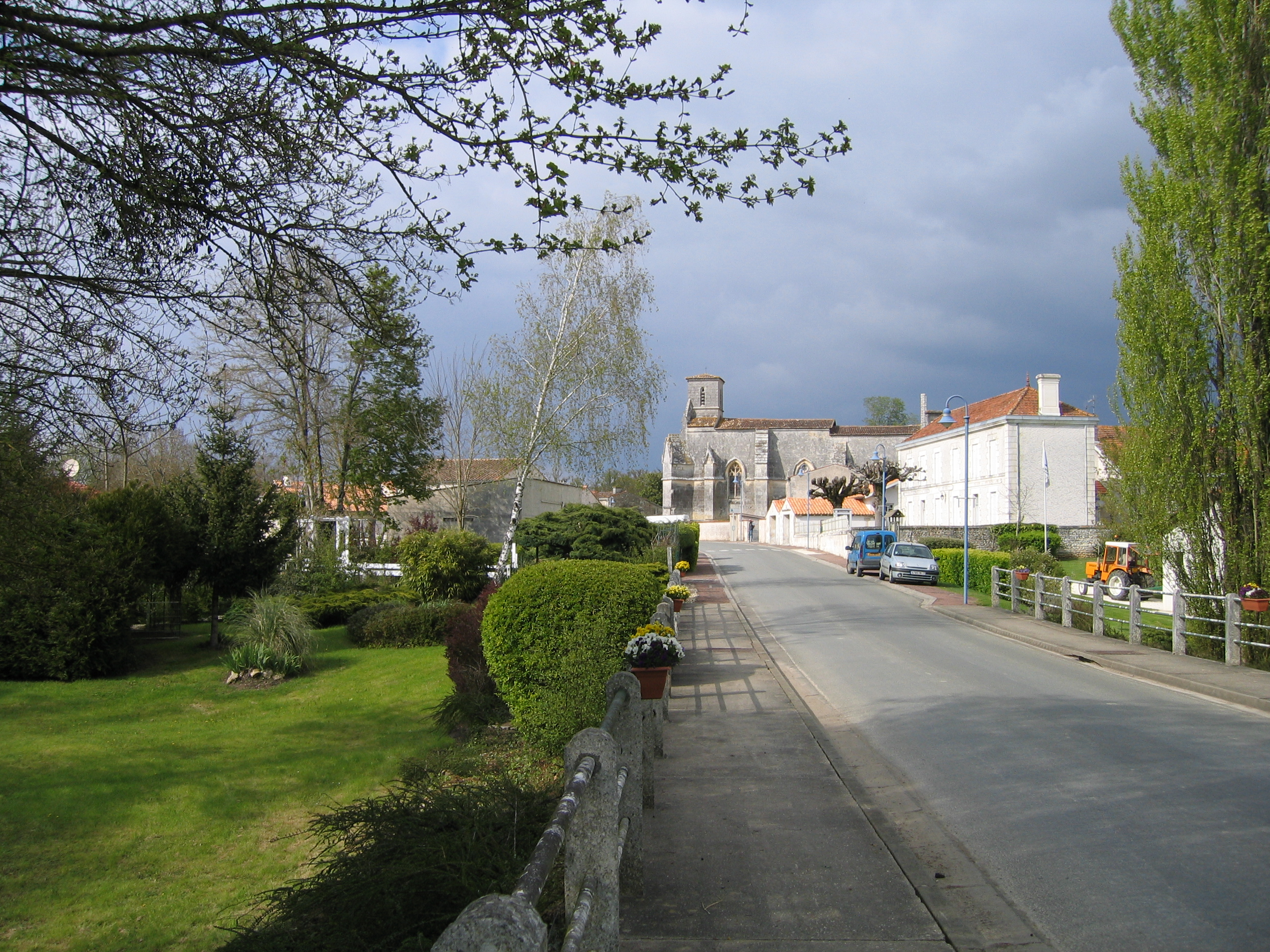 L'entrée du bourg de Varzay